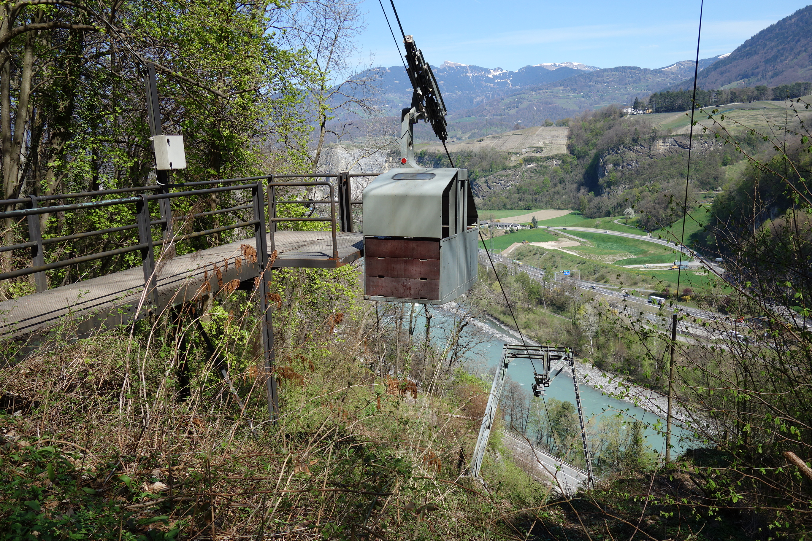 Fort de Cindey, Saint-Maurice VS, Schweiz